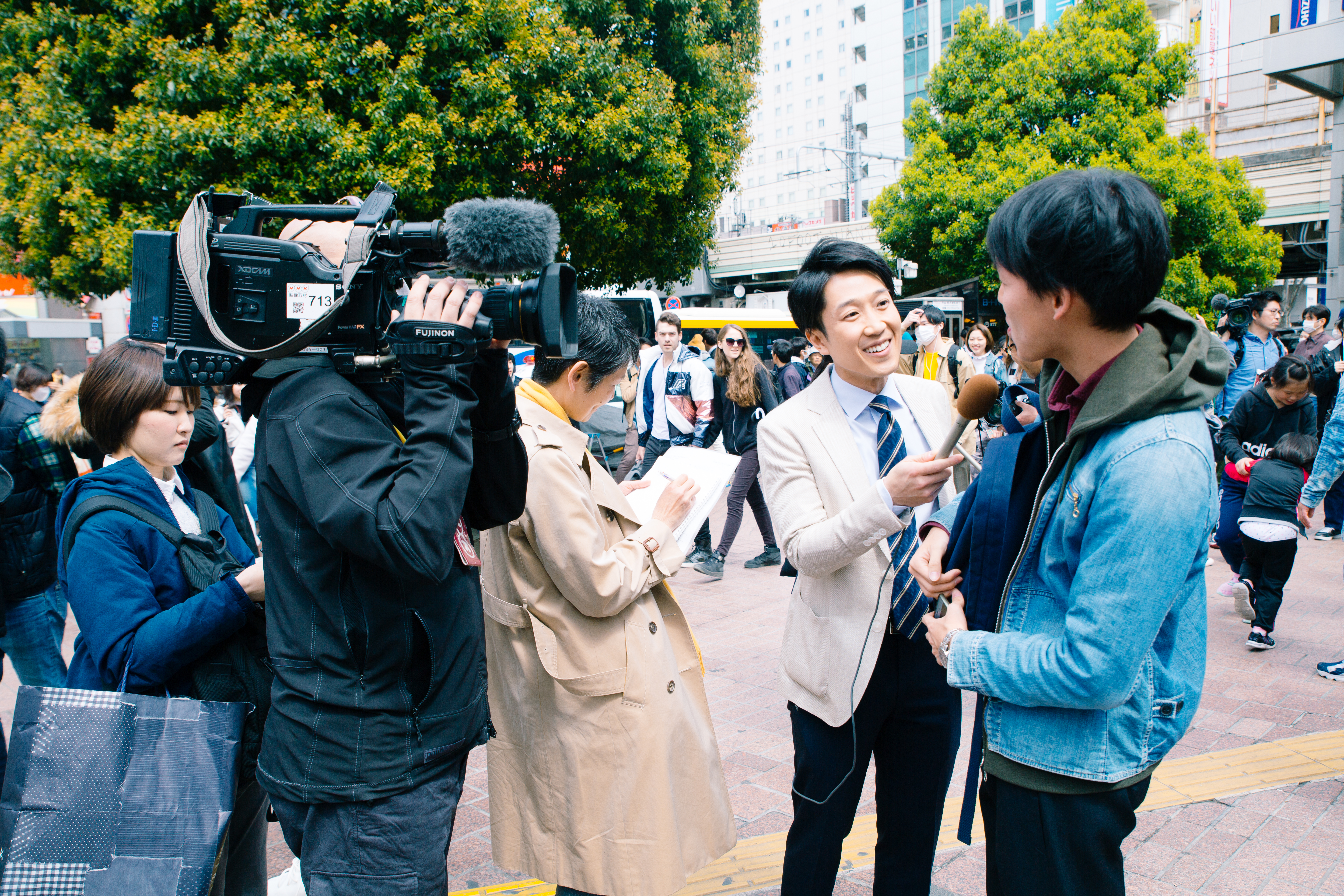 新元号 令和 発表 渋谷駅